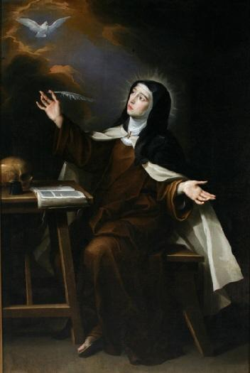 La obra representa a la mística española Santa Teresa de Jesús (1515-1582).